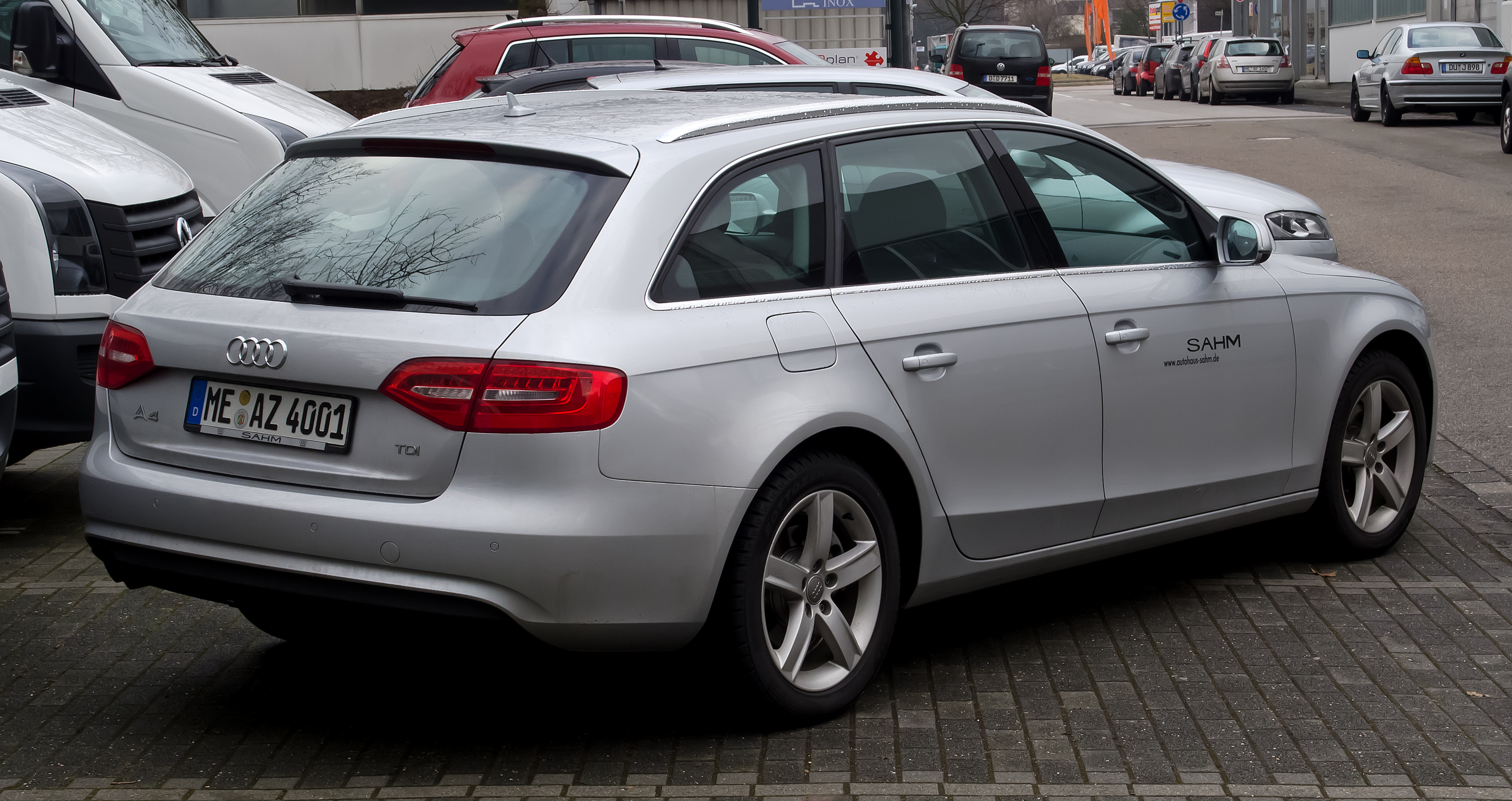 Audi A4 Avant 2.0 TDI (B8, Facelift)